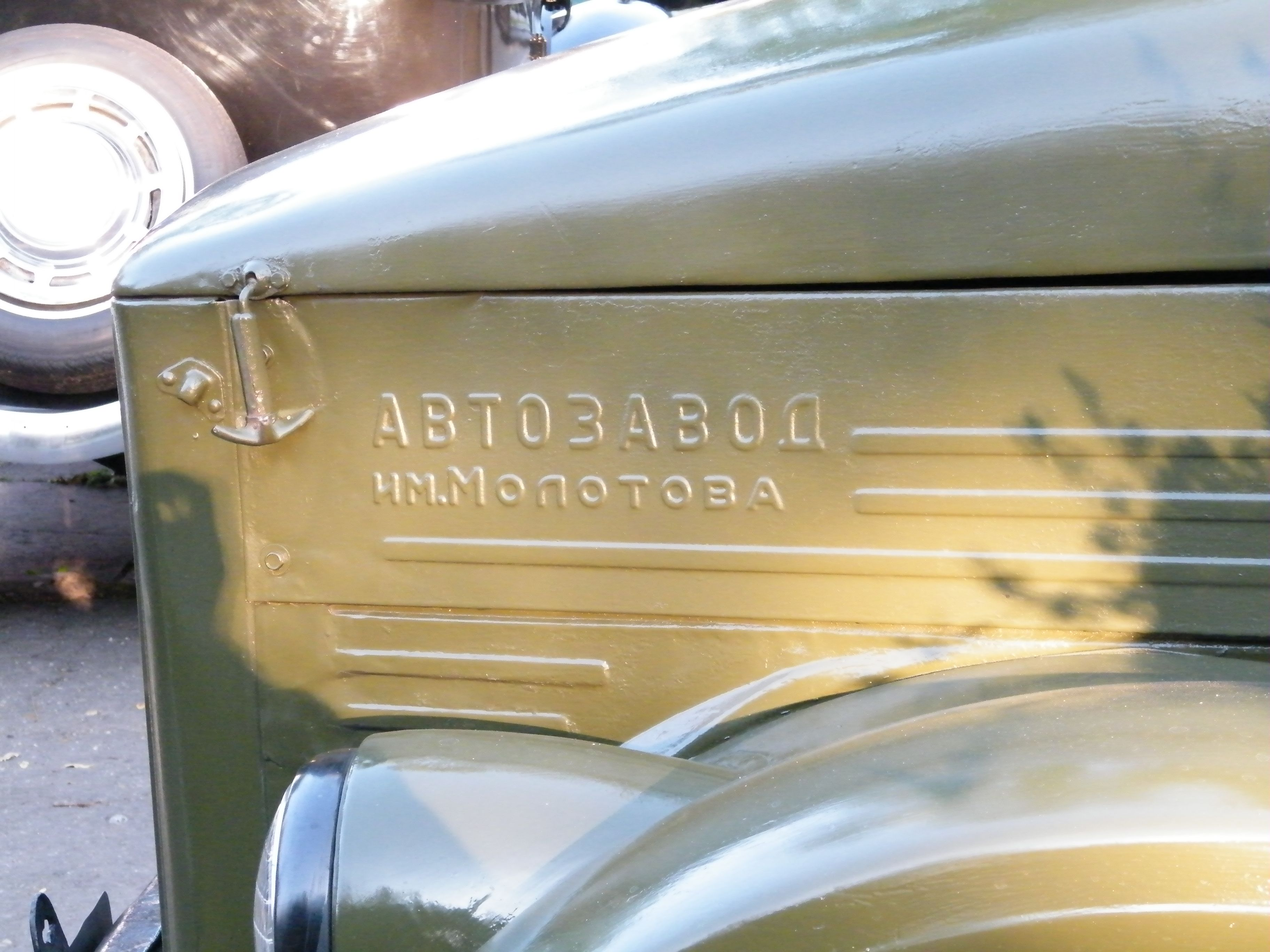 GAZ-51